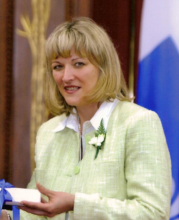 Lise Theriault